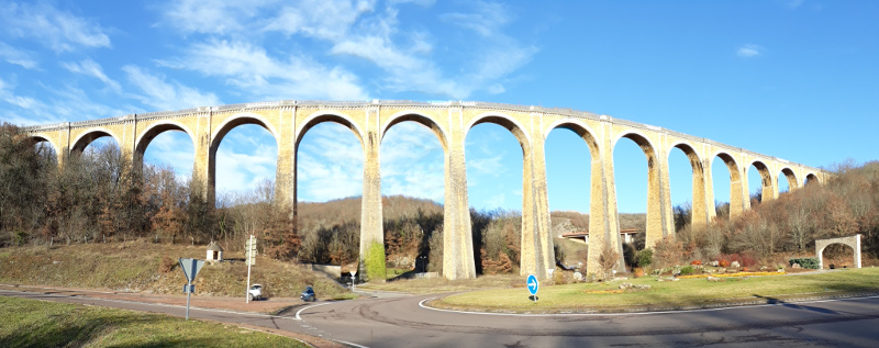 pont ferroviaire (viaduc) de Bramefond sur l'ancienne ligne de chemin de fer entre Souillac et Saint Denis près martel